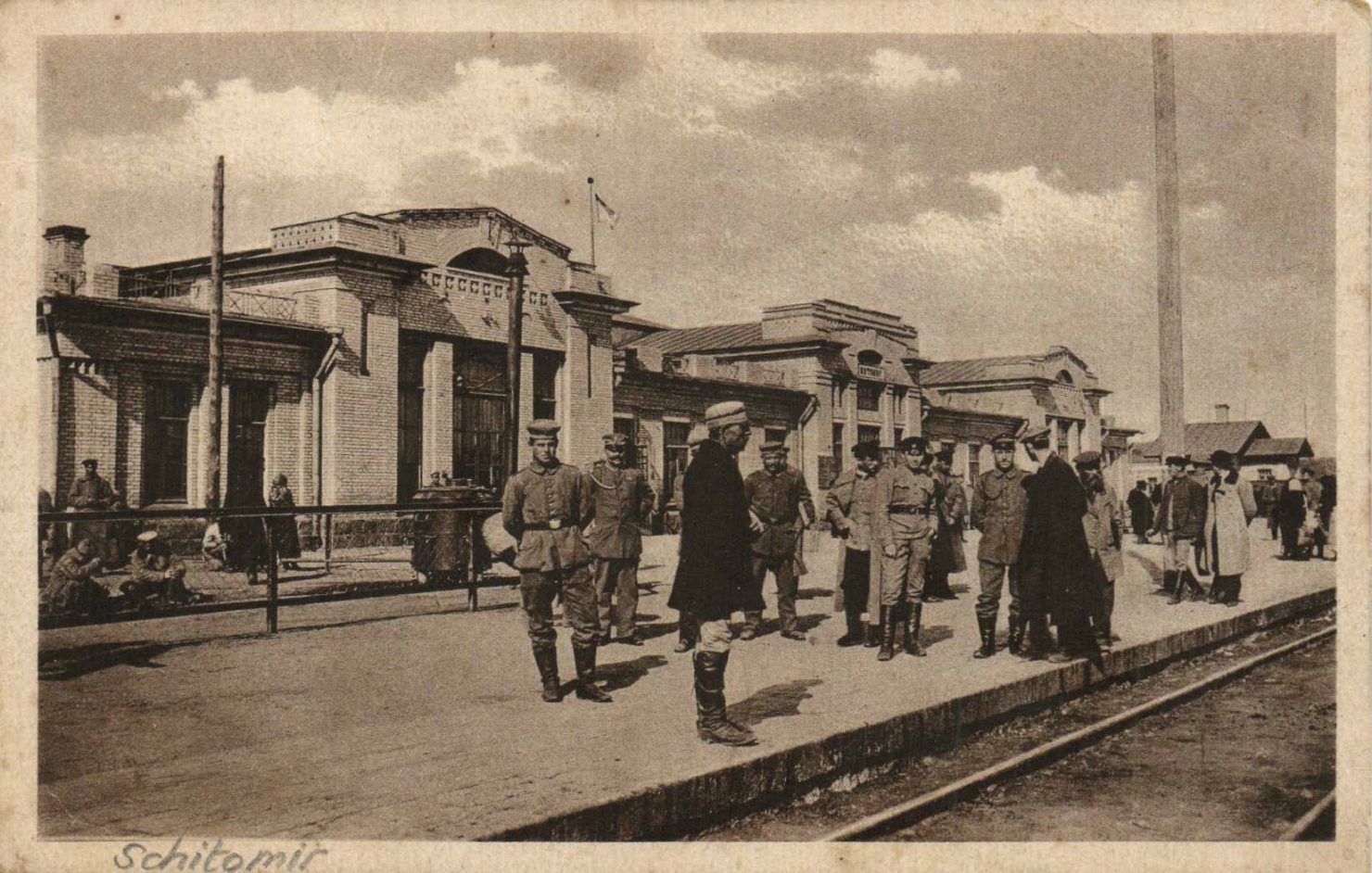 Житомирський вокзал у роки громадянської війни, 1918